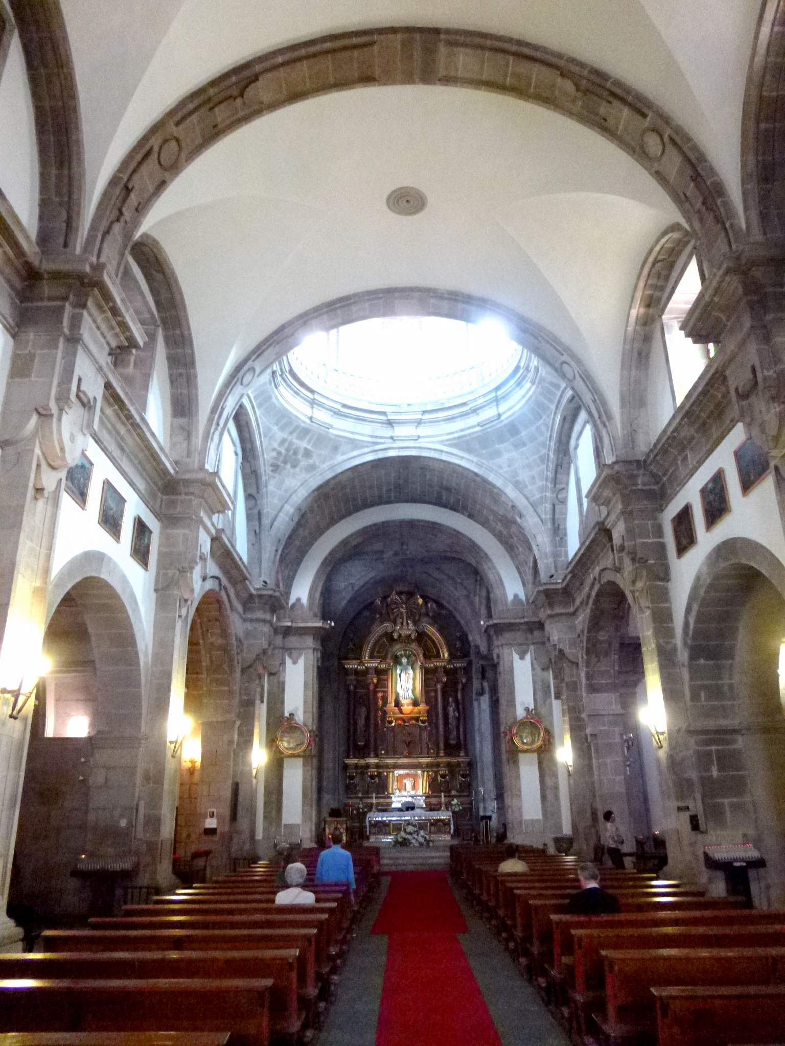 A Coruña - Iglesia de San Nicolás